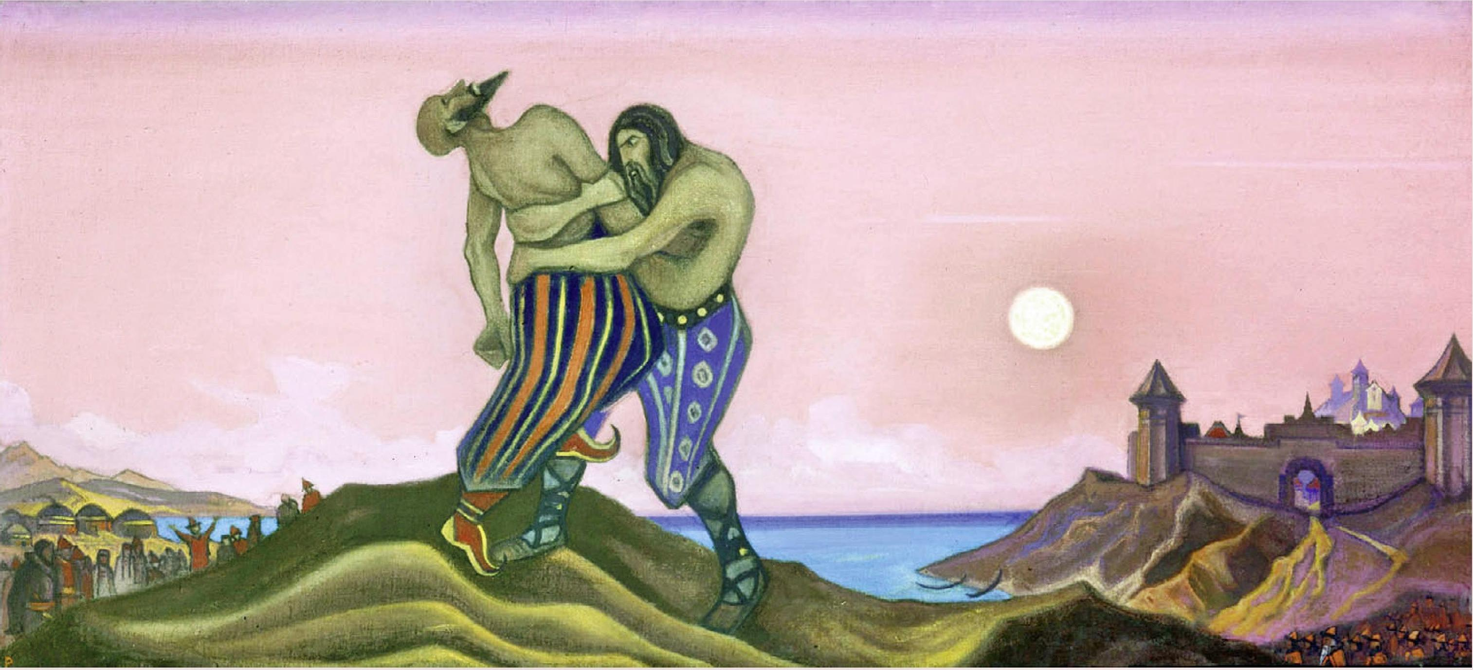 Картина Н.К.Рериха "Единоборство Мстислава с Редедей". Холст, темпера. 57х123 см. Государственный Русский музей, Санкт-Петербург